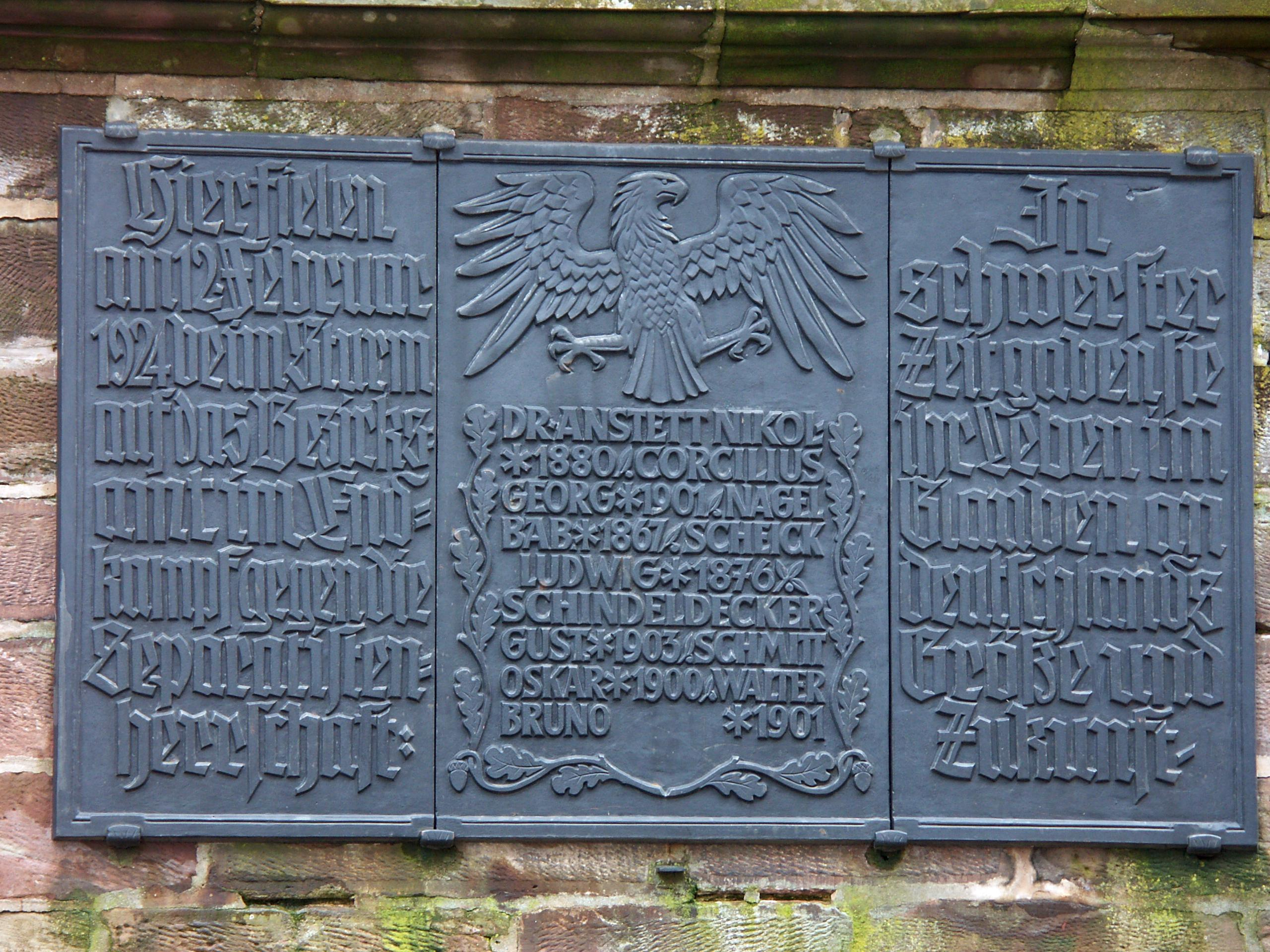 Gedenktafel für die beim Sturm auf das von Separatisten besetzte Bezirksamt umgekommenen Bürger